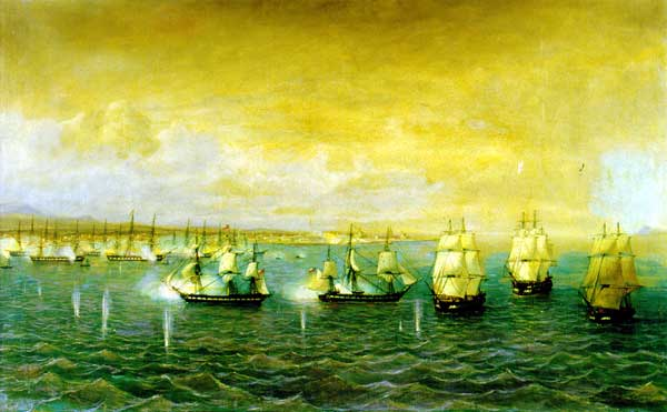 Vista del ataque dado en El Callao por la escuadra chilena del almirante lord Cochrane a la española del brigadier Vacaro (28 de febrero de 1819).